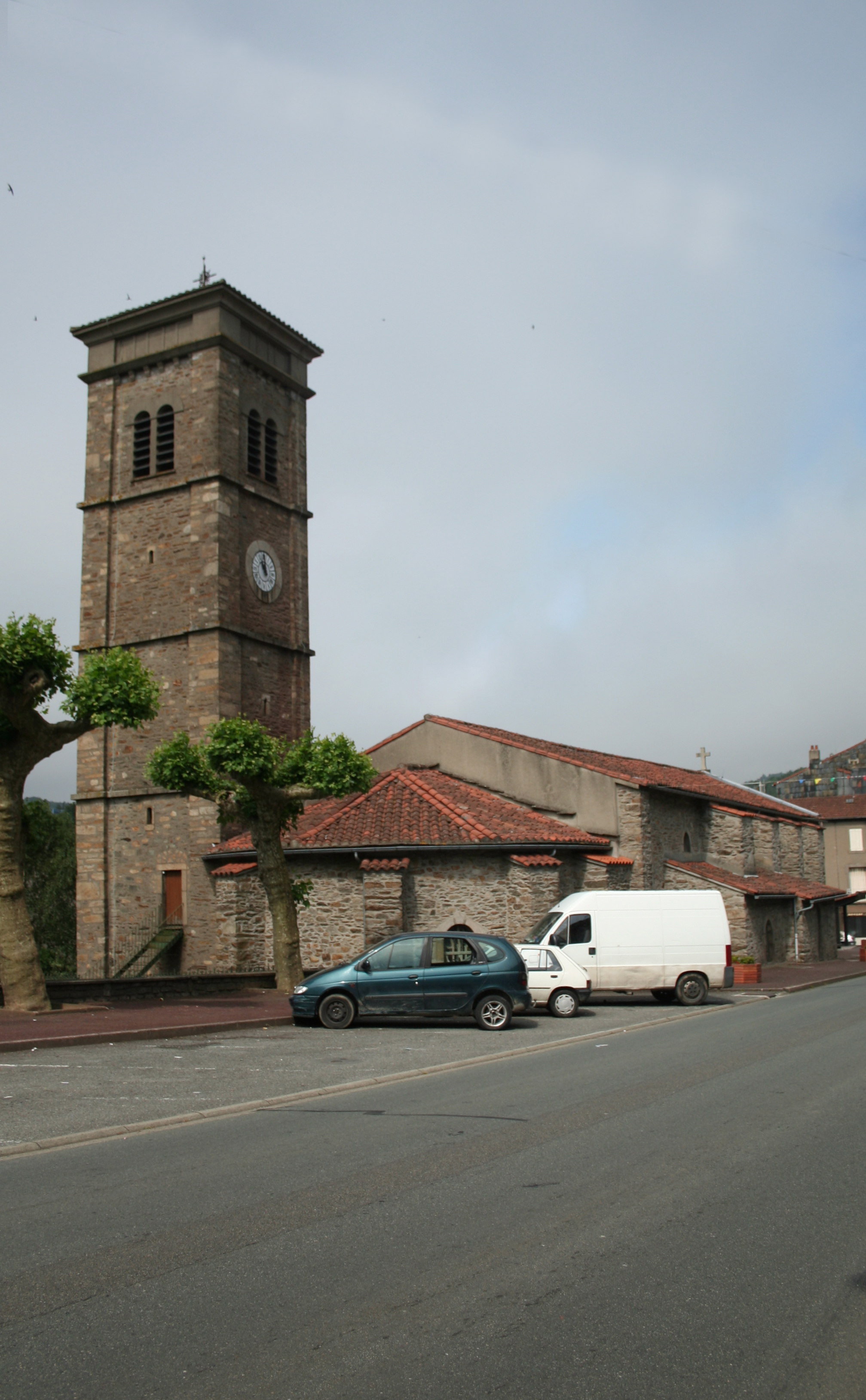 Labastide-Rouairoux (Tarn) - église Saint-Saturnin.